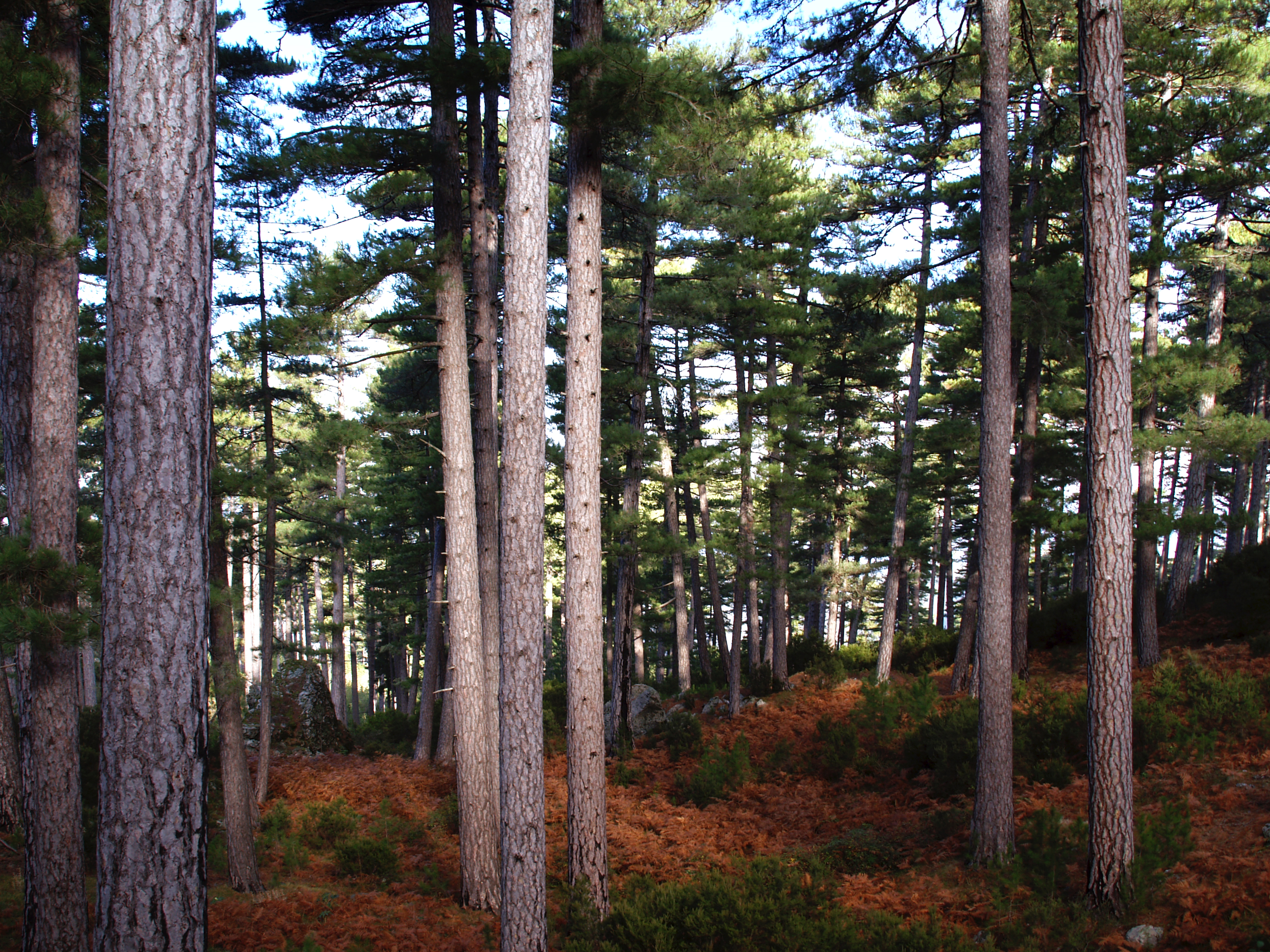 Pin laricio de Corse, Noceta et Rospigliani, Centre Corse (Corse) - Forêt de Padula, partie de la forêt territoriale de Rospa-Sorba